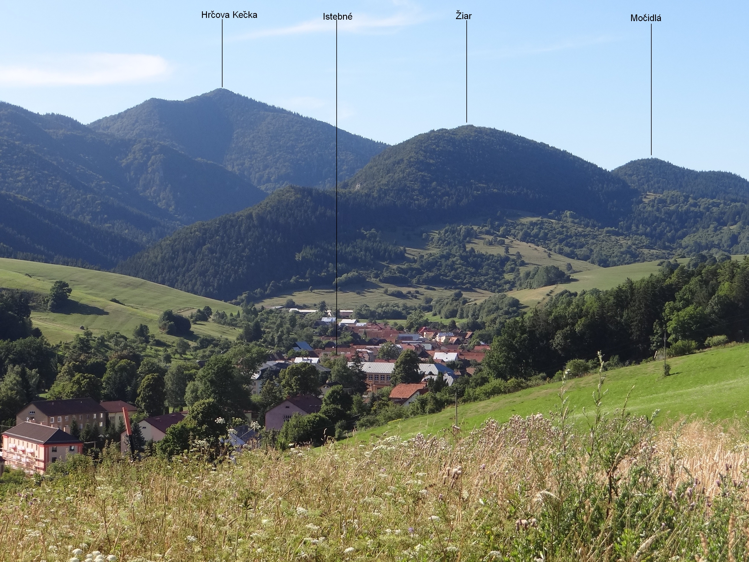 View from Istebné